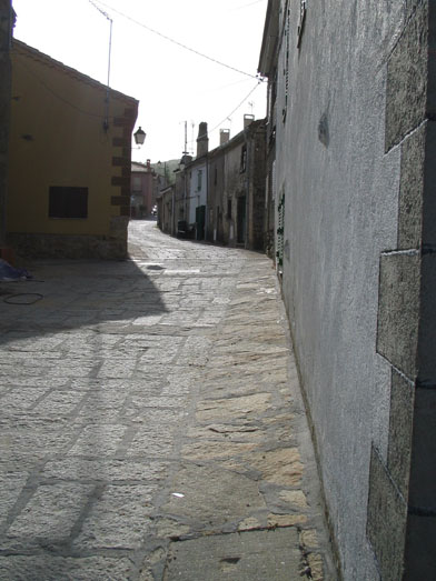 Street in La Acebeda (Madrid)